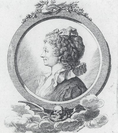 Bildnis der deutschbaltischen Schriftstellerin Sophie Schwarz. Stich von Daniel Chodowiecki.